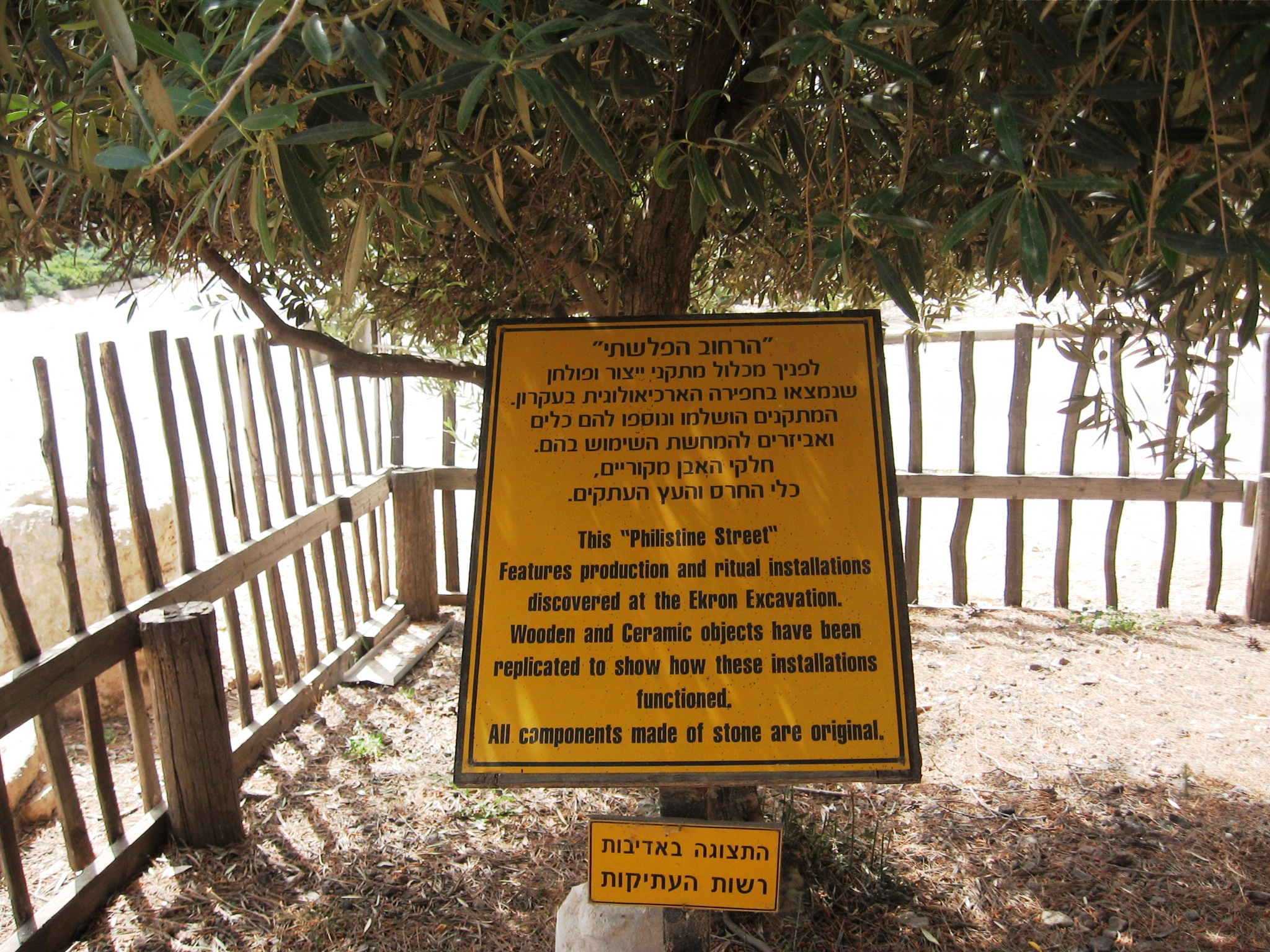 רחוב פלישתי משוחזר מעקרון העתיקה - היום בקיבוץ רבדים רישיון נוצר על ידי he:משתמש:Daniel Ventura